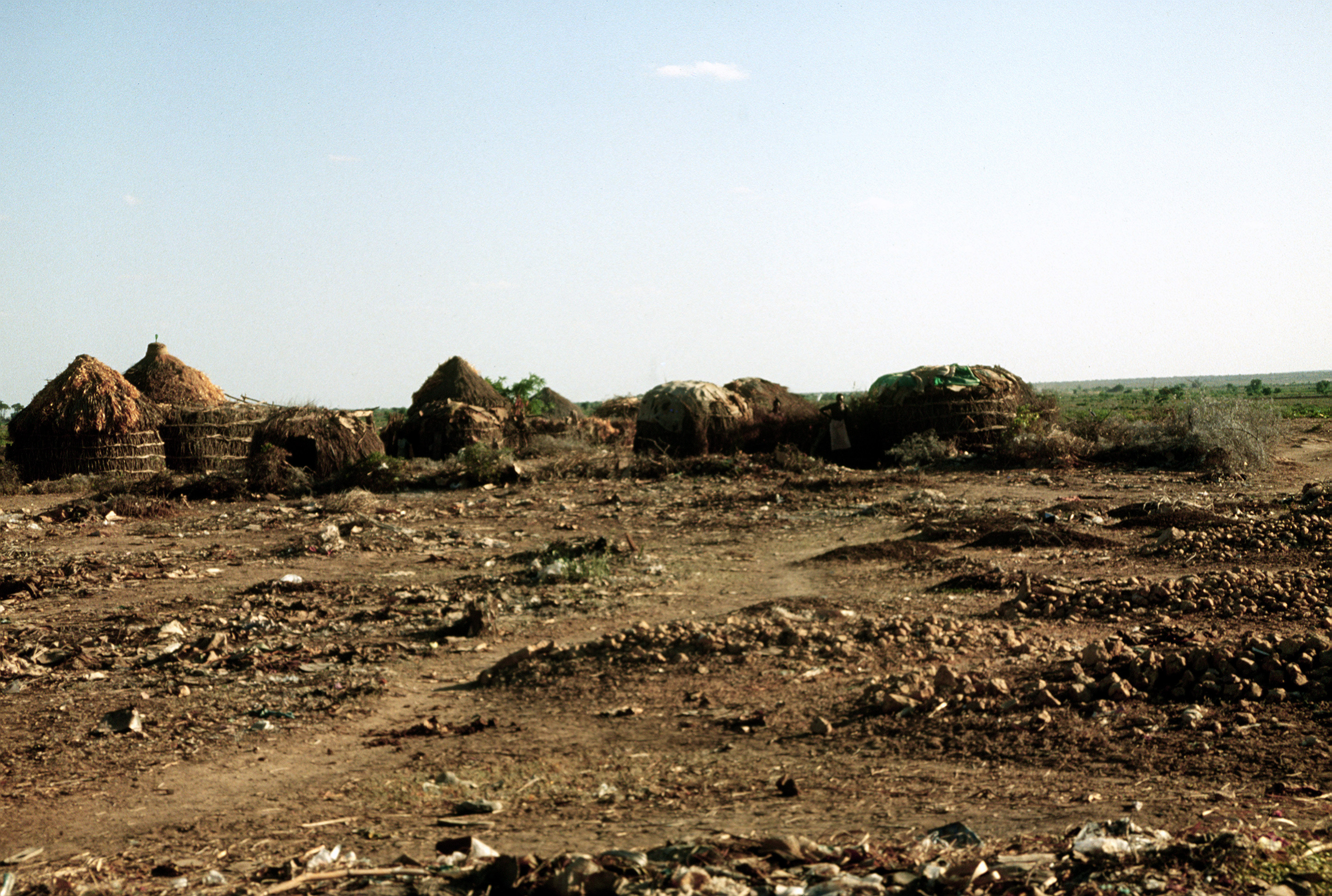 Refugee huts near Beledweyne (Belet Weyne).